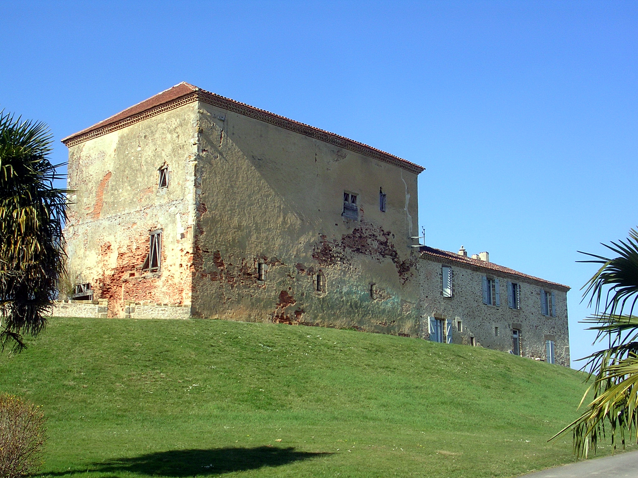 Château d'Aon à Hontanx, dans le département français des Landes